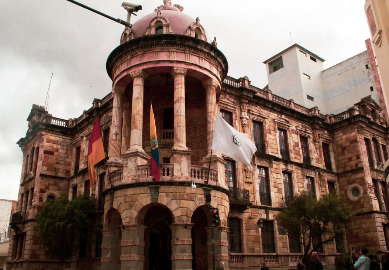 Vista del primer edificio de la Alcaldía de Cuenca (Antiguo edificio del ex-Banco de Azuay).